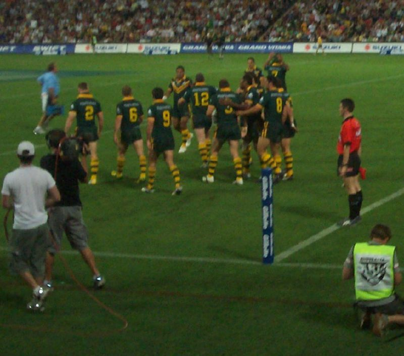 Photo lors d'un match de l'équipe d'Australie de rugby à XIII